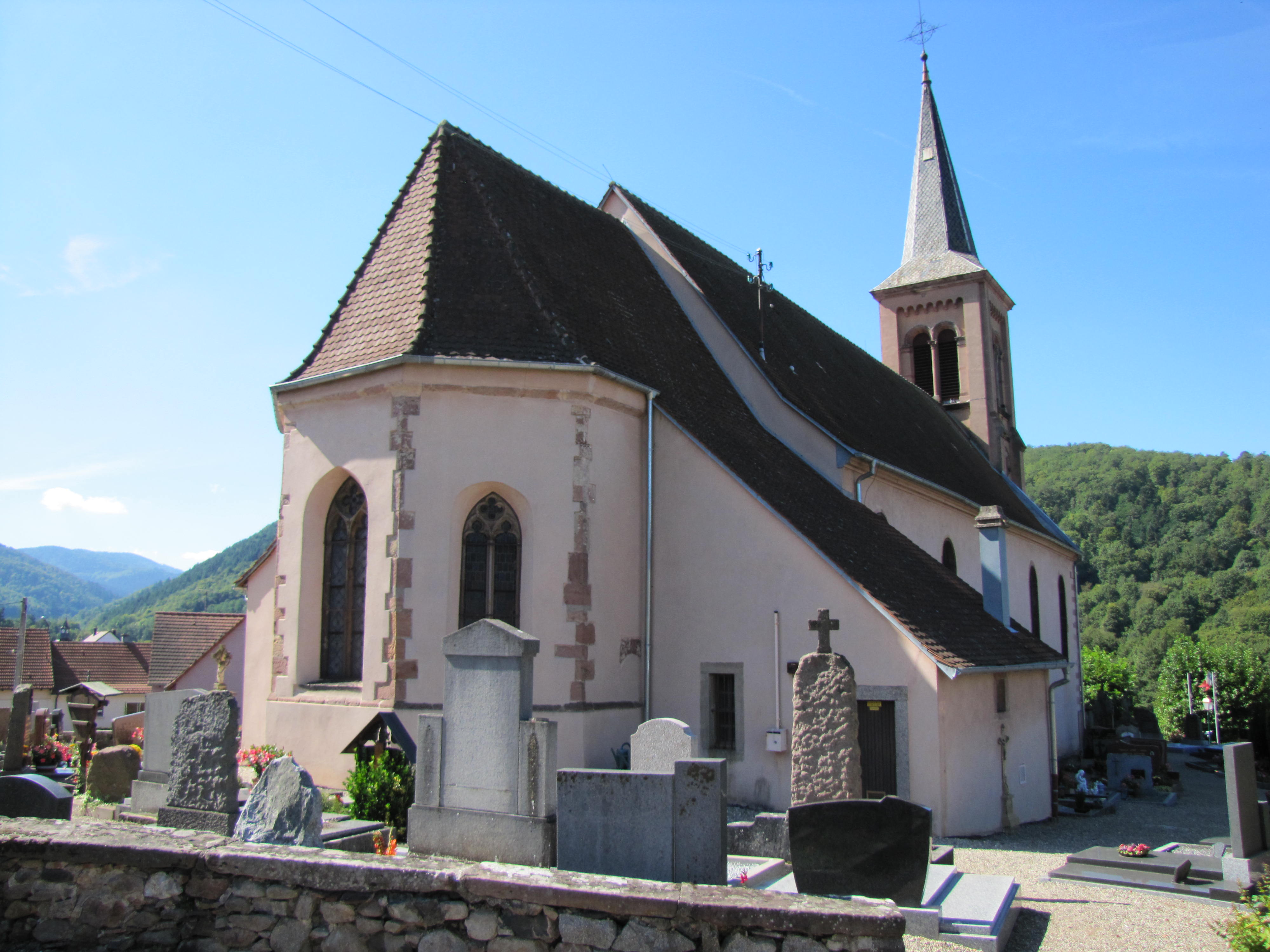 Alsace, Haut-Rhin, Soultzbach-les-Bains, Église Saint-Jean-Baptiste (XVIe-XVIIIe-XIXe), rue de l'église. It is indexed in the Base Mérimée, a database of architectural heritage maintained by the French Ministry of Culture, under the references PA00085685 and IA68001053.